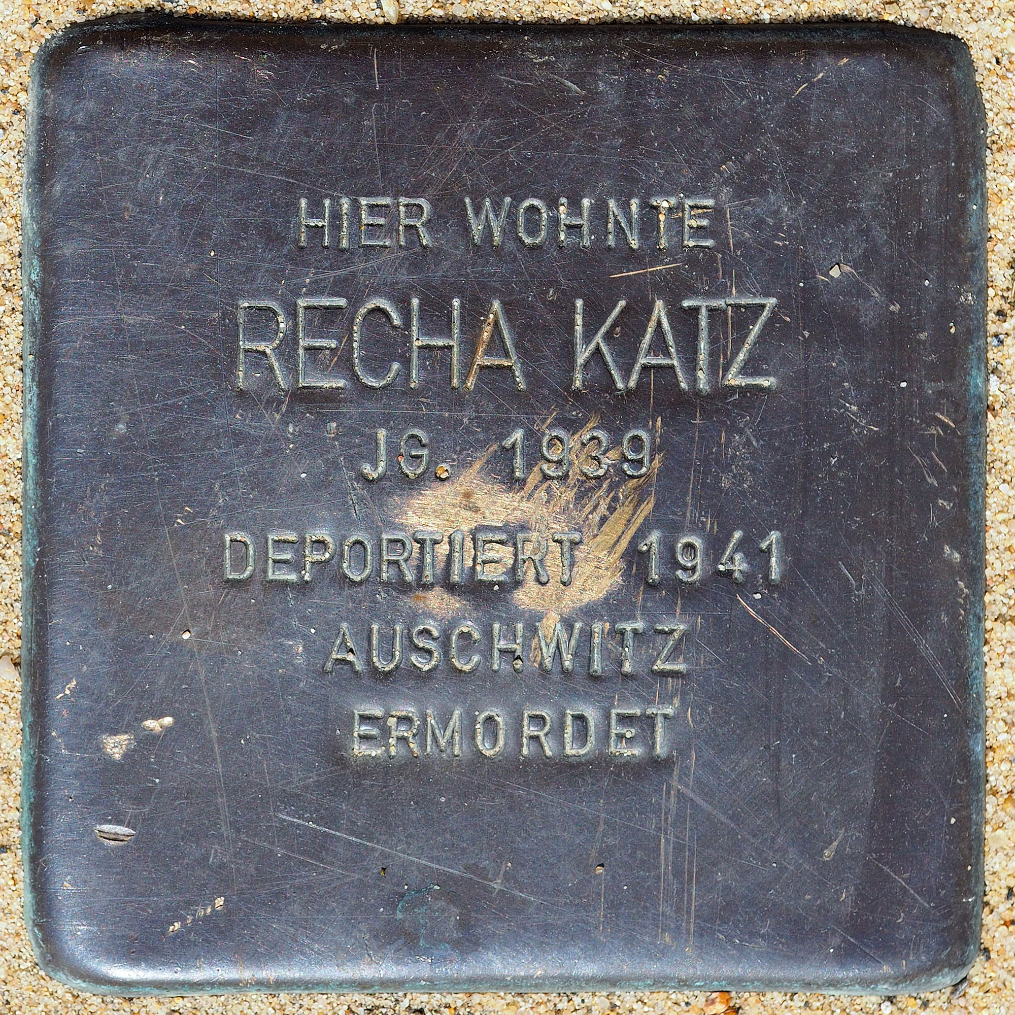 Stolpersteine GV: Katz, Recha